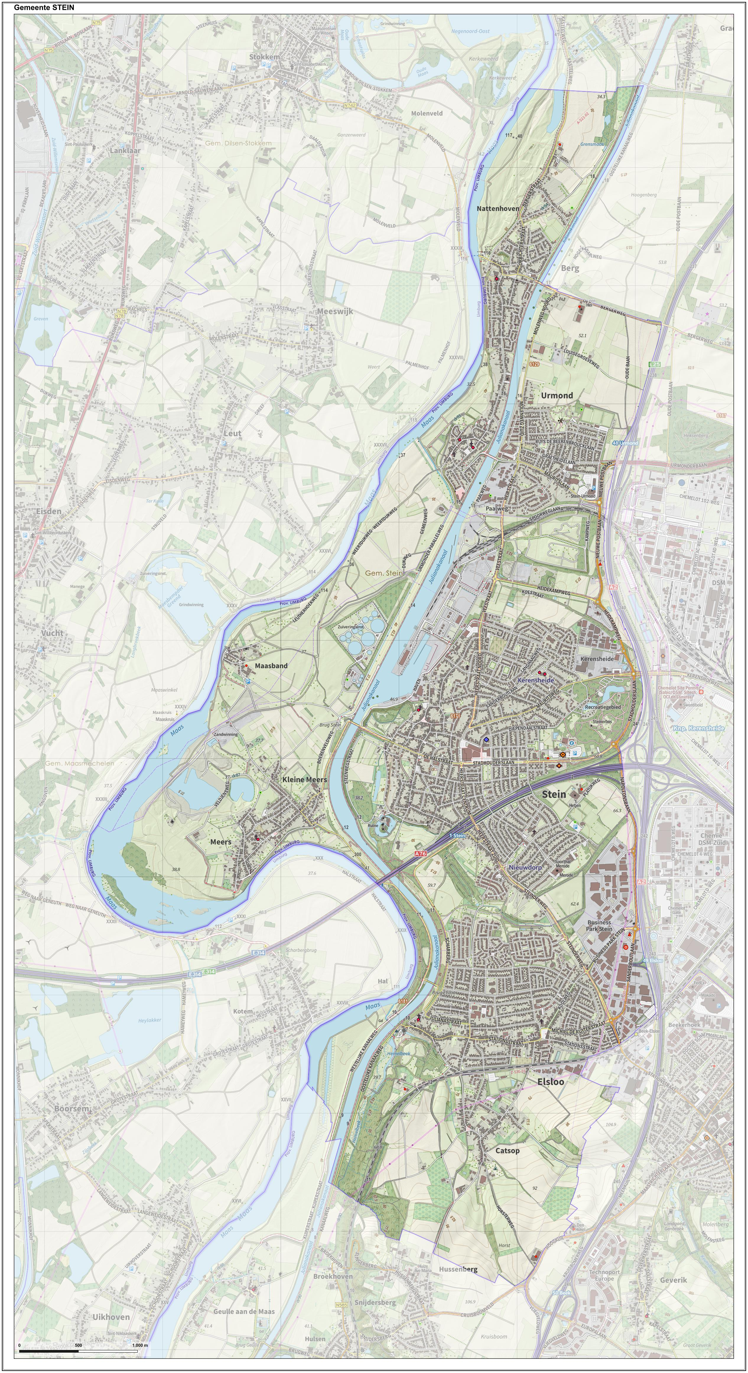 Topografische gemeentekaart. Resolutie: 400 pixels/km. Kaartbeeld samengesteld uit de open geodata van de Top10NL en Top25namen (Kadaster), Creative Commons-BY licentie. Gebouwvlakken uit open geodata BAG extract. Wegen uit de OpenStreetMap, OpenStreetMap community. Reliëfschaduw uit de Actuele Hoogtekaart AHN2. Samenstelling en kleurenschema: Jan-Willem van Aalst, met QGIS. Zie ook de Legenda.